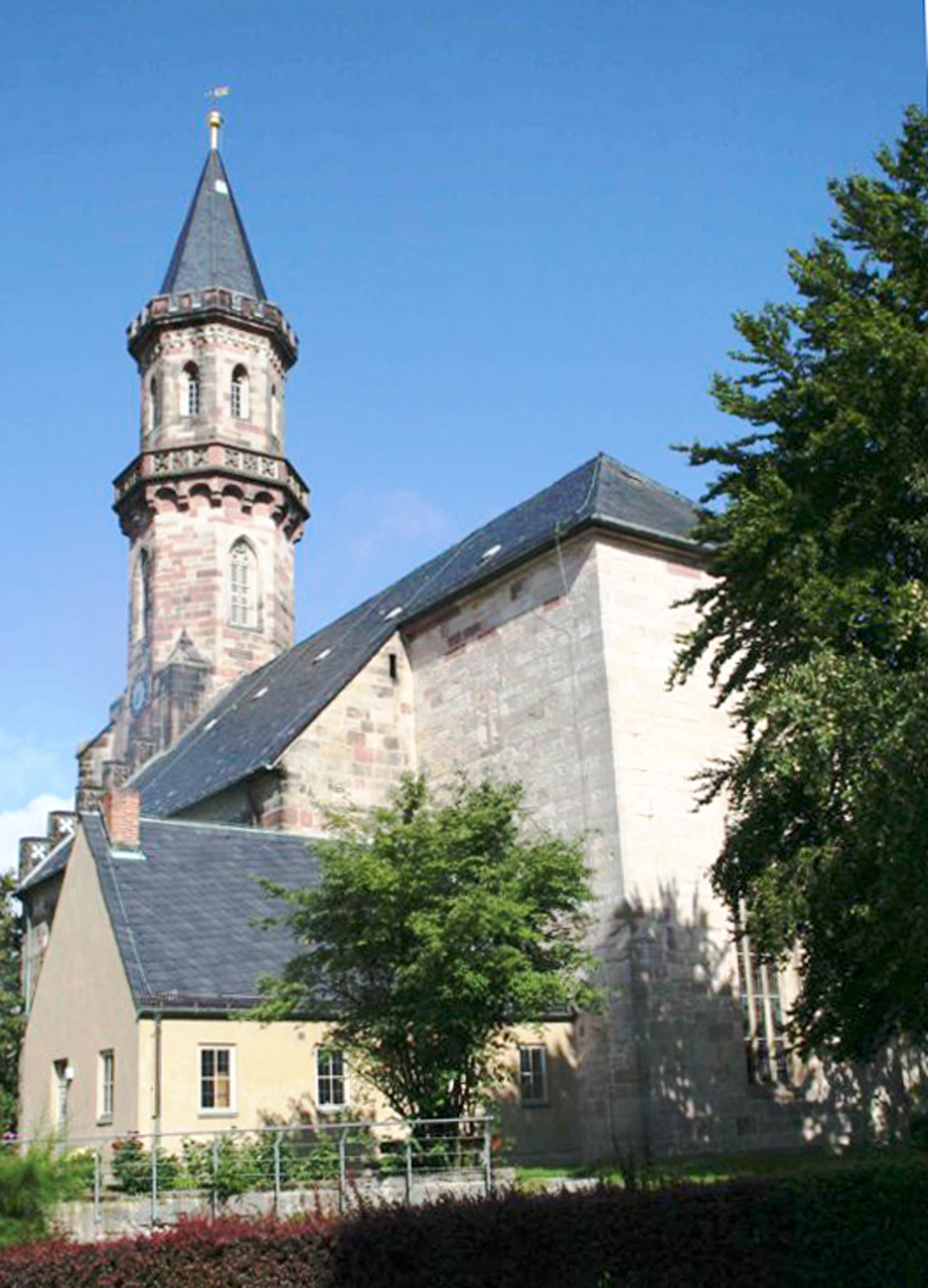 ev. Stadtkirche Neustadt bei Coburg evangelische Stadtkirche St. Georg in Neustadt bei Coburg, Landkreis Coburg